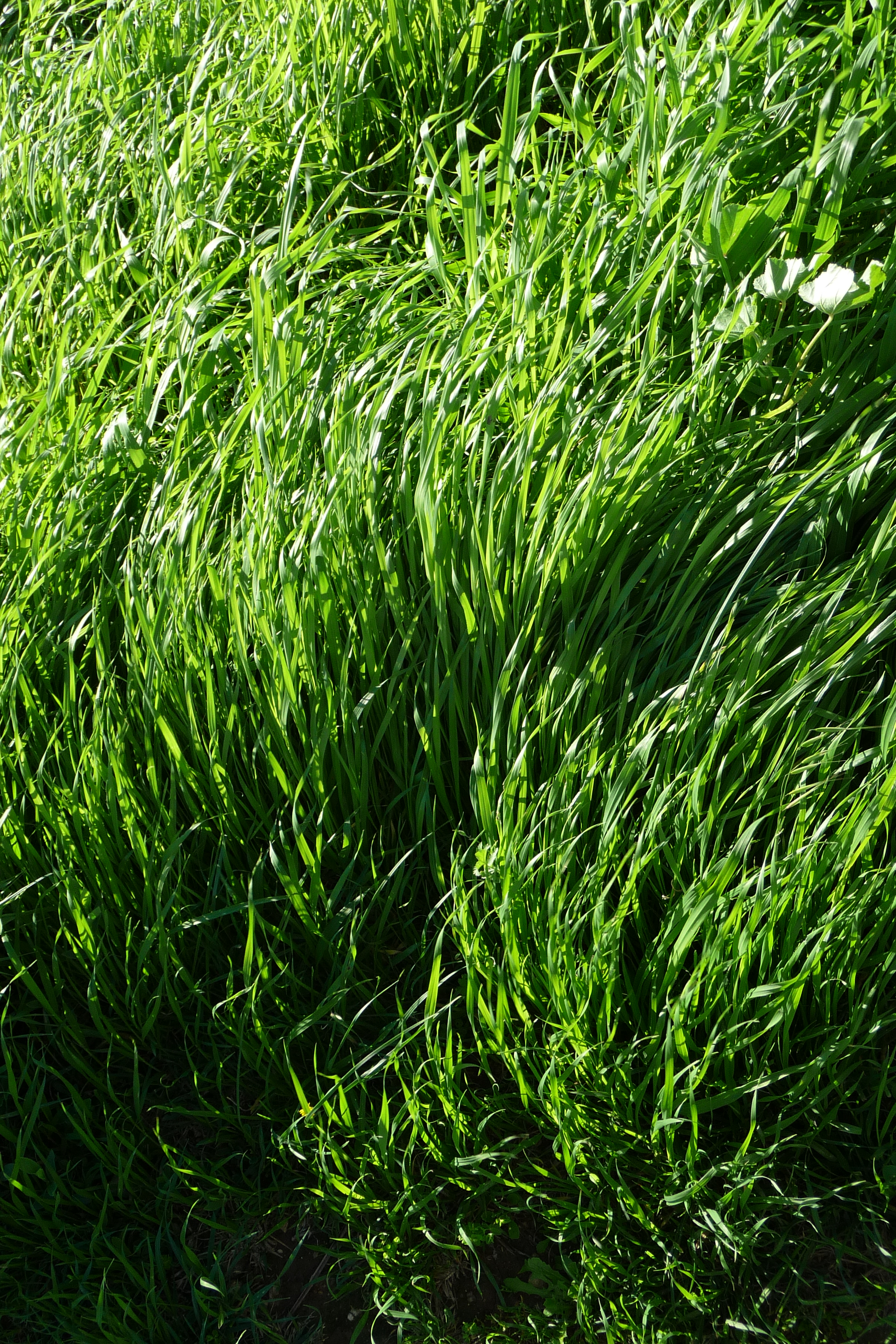 שמורת טבע בעמק זבולון, מזרחית לקריית ביאליק. השמורה כוללת הן את המעיינות והביצות המהווים את מקורו של נחל נעמן והן את האתר הארכאולוגי תל אפק. השמורה הוכרזה ב-1979 והיא משתרעת על פני 660 דונם. ב-1996 הוכרה השמורה כ"אתר רמסר" בהתאם לאמנת רמסר לשימור ולפיתוח בר-קיימא של בתי גידול לחים.